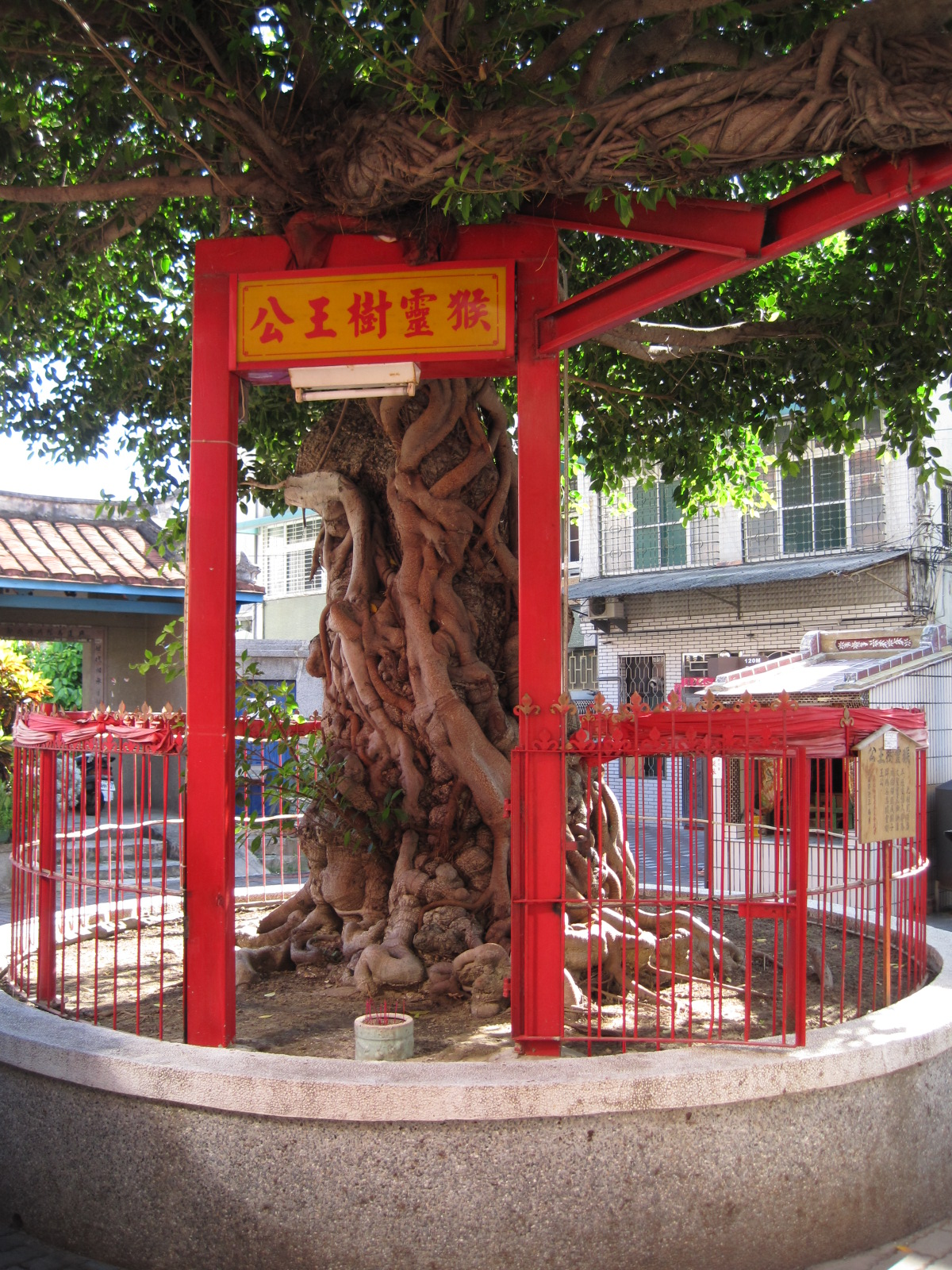 臺南萬福庵前的猴靈樹王公